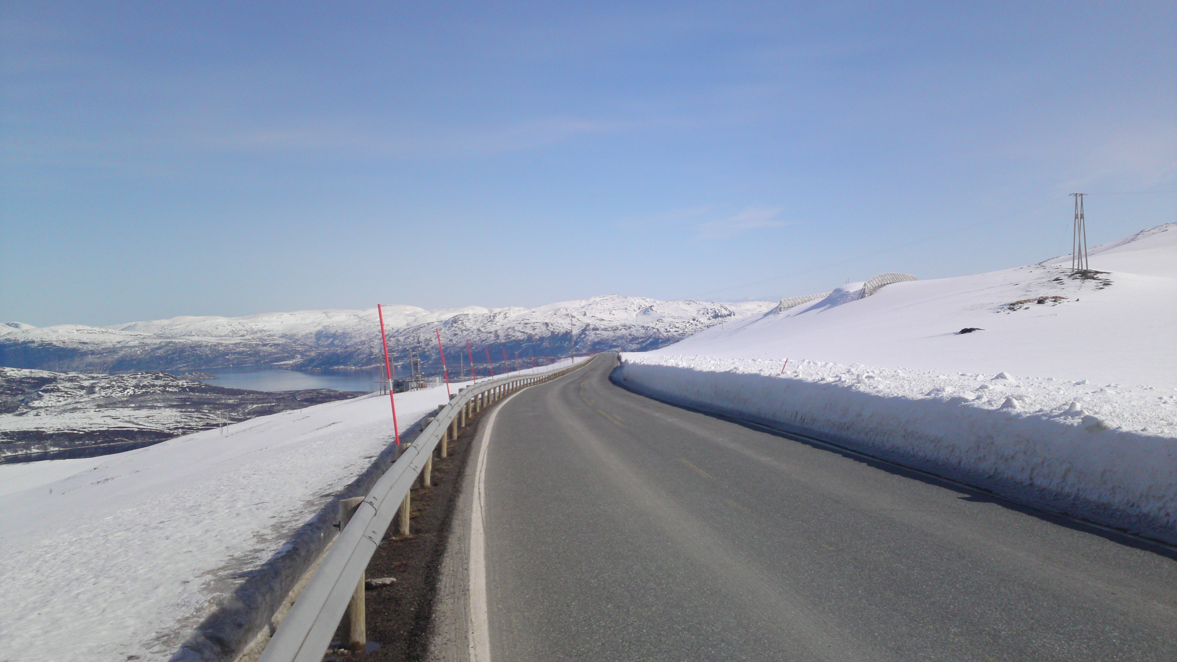 Kvænangsfjellet Nord-Troms, værutsatt strekning som er stengt for trafikk 10-15 vinterdager i året. Utsikt over Kvænangen.